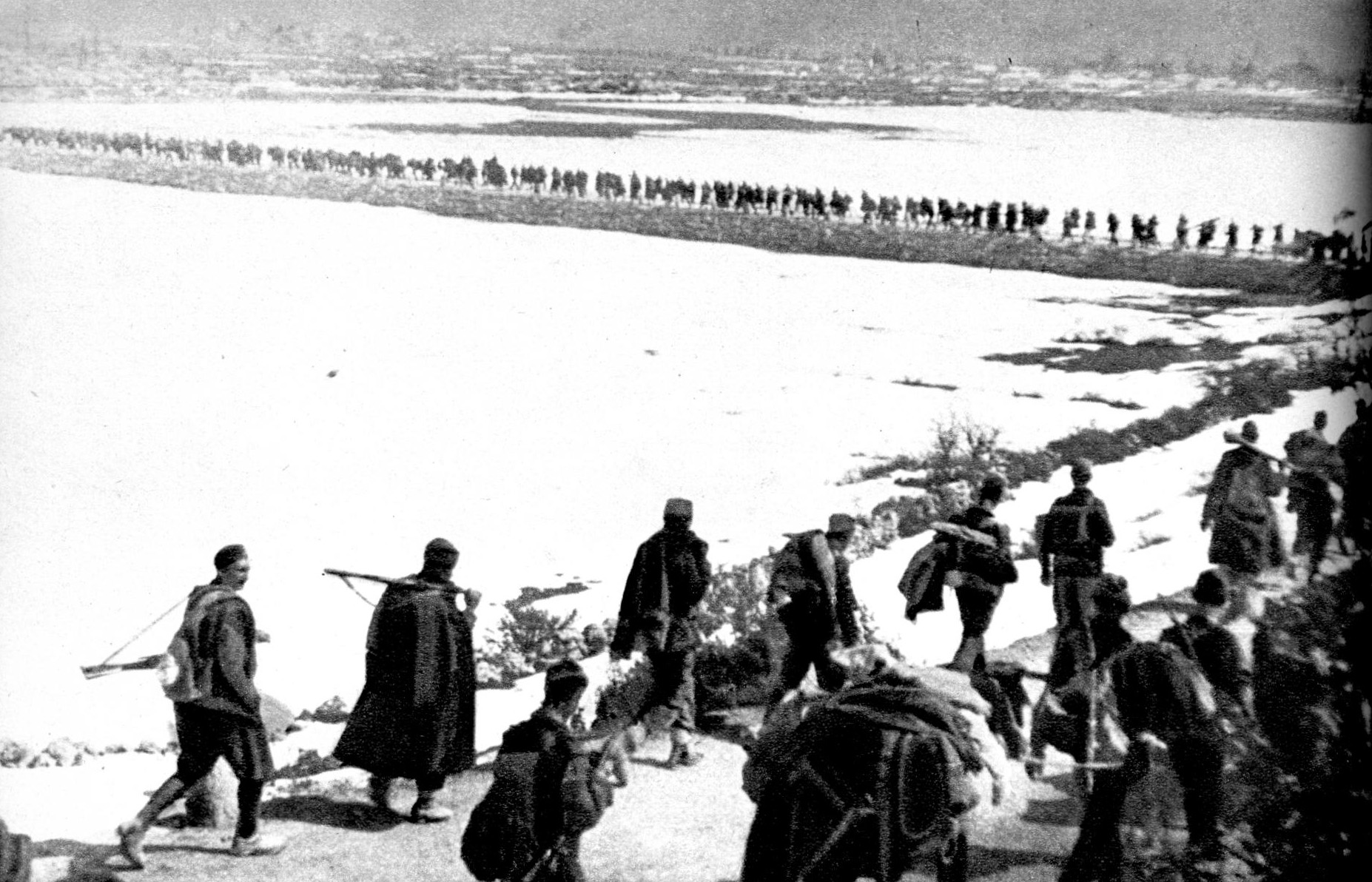 XX divizija kreće iz Obrovca kroz Liku za Gračac.